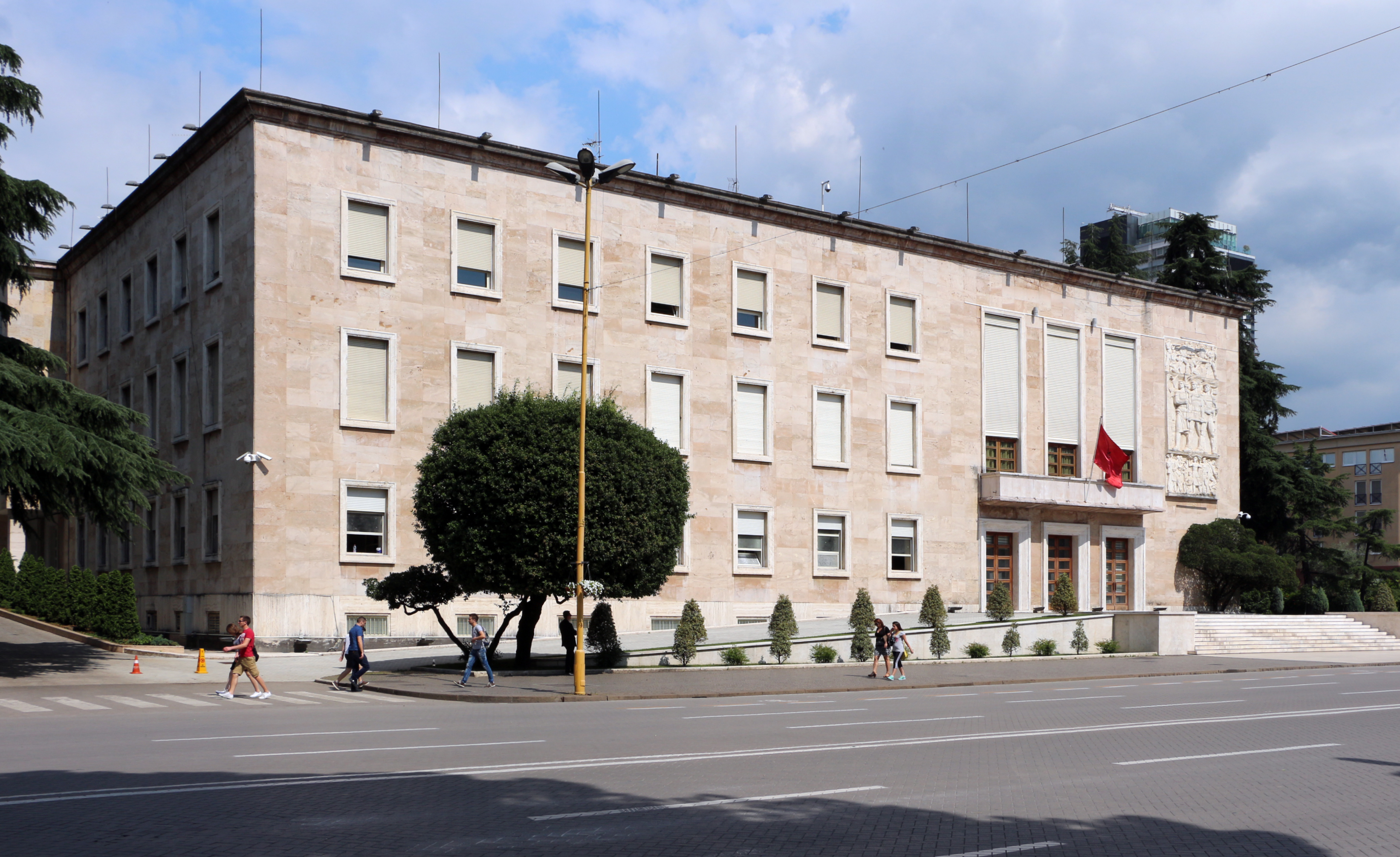 Kryeministria